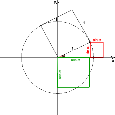 Triginometrischer Pytagoras